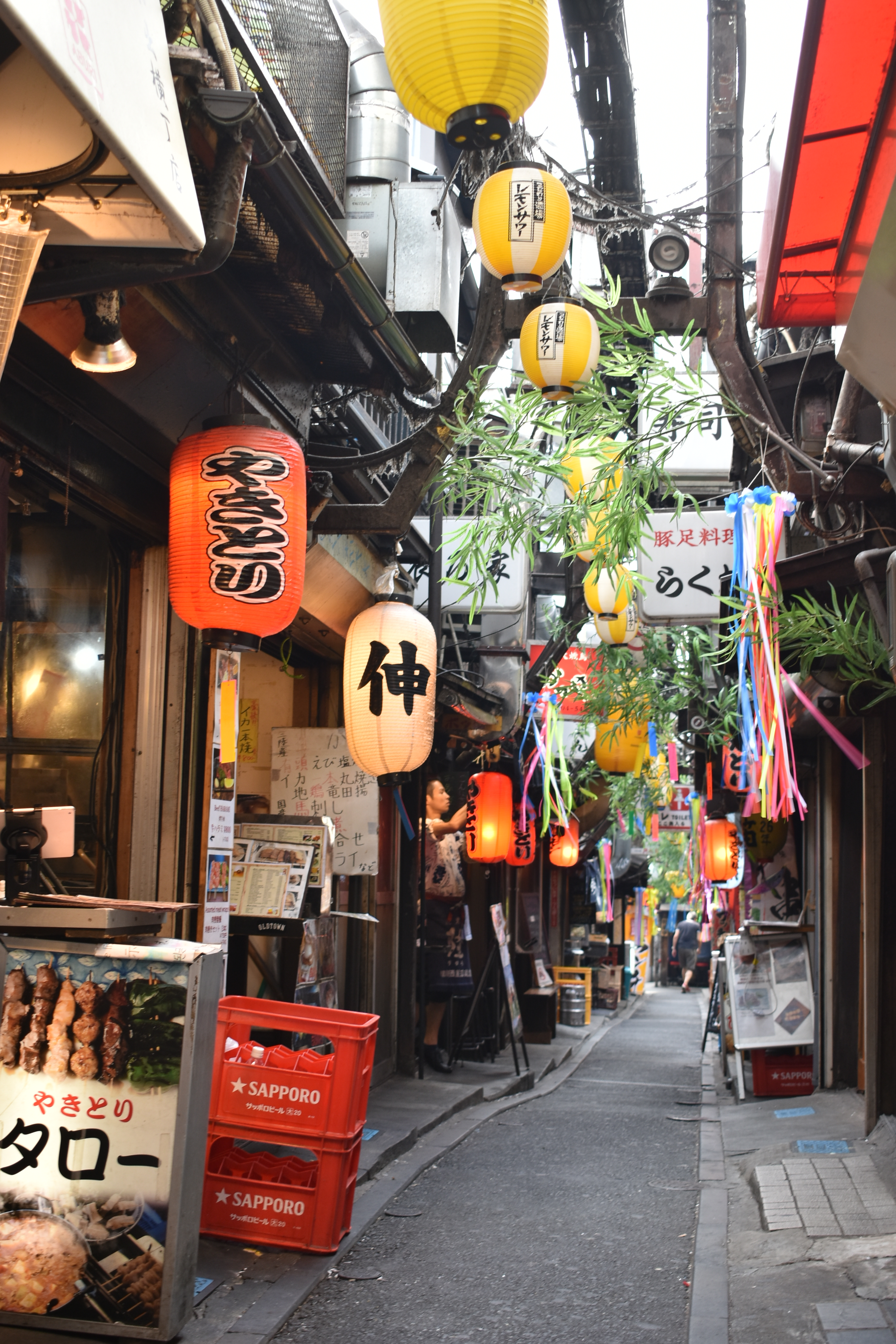 新宿 思い出横丁 Nikon D3400